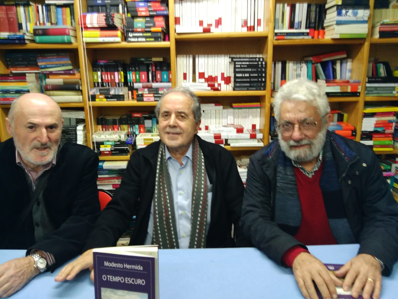 Presentación de "O tempo escuro" na Libraría Paz de Pontevedra: Anxo González Guerra, Modesto Hermida e Bieito Ledo